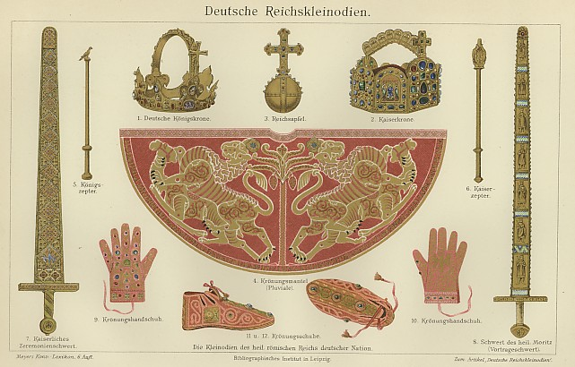 Zustammenstellung der wichtigsten Insignien der Reichskleinodien des Heiligen Römischen Reiches, aus Meyers Konversationslexikon. Legende: Deutsche Königskrone (Hier hat sich Meyers Konversationslexikon geirrt. Es handelt sich um die Kaiserkrone der Aachener Karlsbüste) Kaiserkrone Reichsapfel Krönungsmantel (Pluviale) Königszepter Kaiserzepter Kaiserliches Zeremonienschwert Schwert des heil. Moritz (Vortrageschwert) Krönungshandschuh Krönungshandschuh Krönungsschuh Krönungsschuh